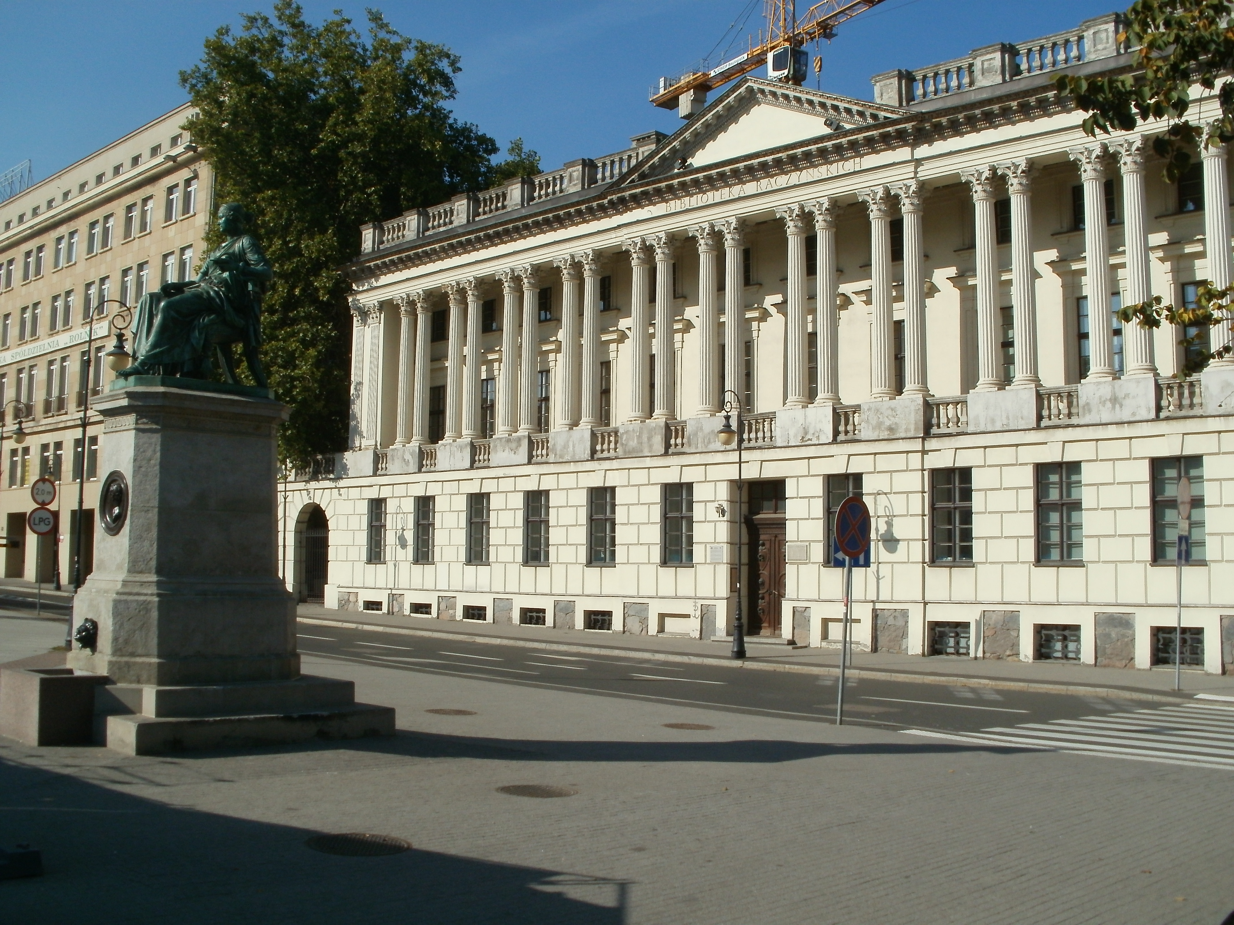 Biblioteka Raczyńskich w Poznaniu